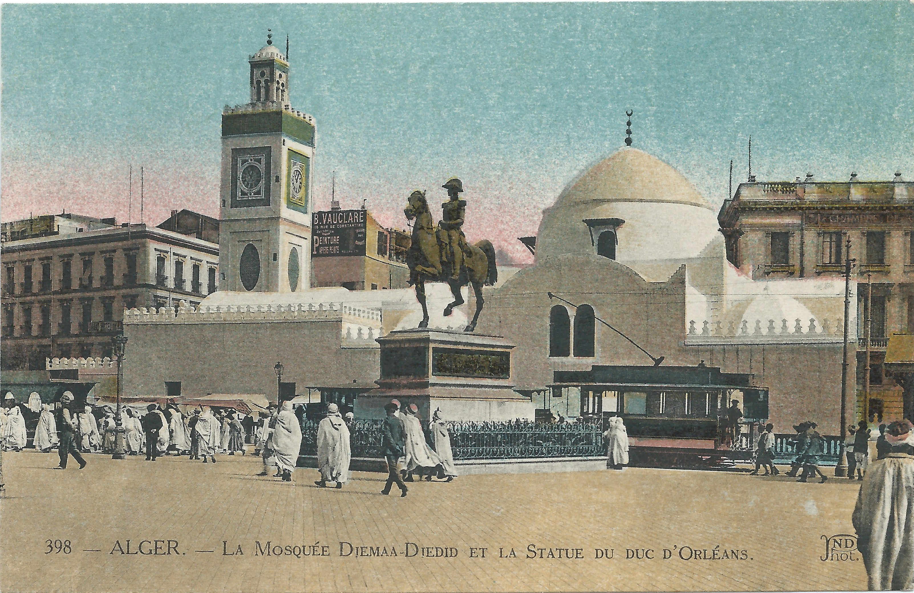 Een moskee en standbeeld in Algiers